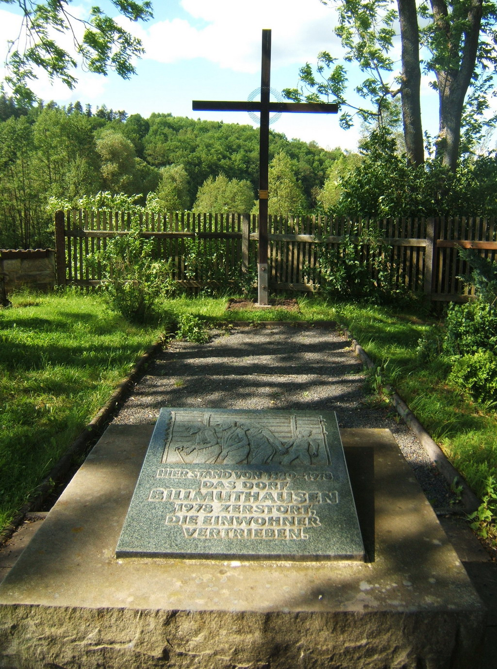 Billmuthausen